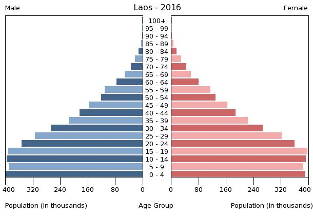 A population pyramid illustrates the age and sex structure of a country's population and may provide insights about political and social stability, as well as economic development. The population is distributed along the horizontal axis, with males shown on the left and females on the right. The male and female populations are broken down into 5-year age groups represented as horizontal bars along the vertical axis, with the youngest age groups at the bottom and the oldest at the top. The shape of the population pyramid gradually evolves over time based on fertility, mortality, and international migration trends.